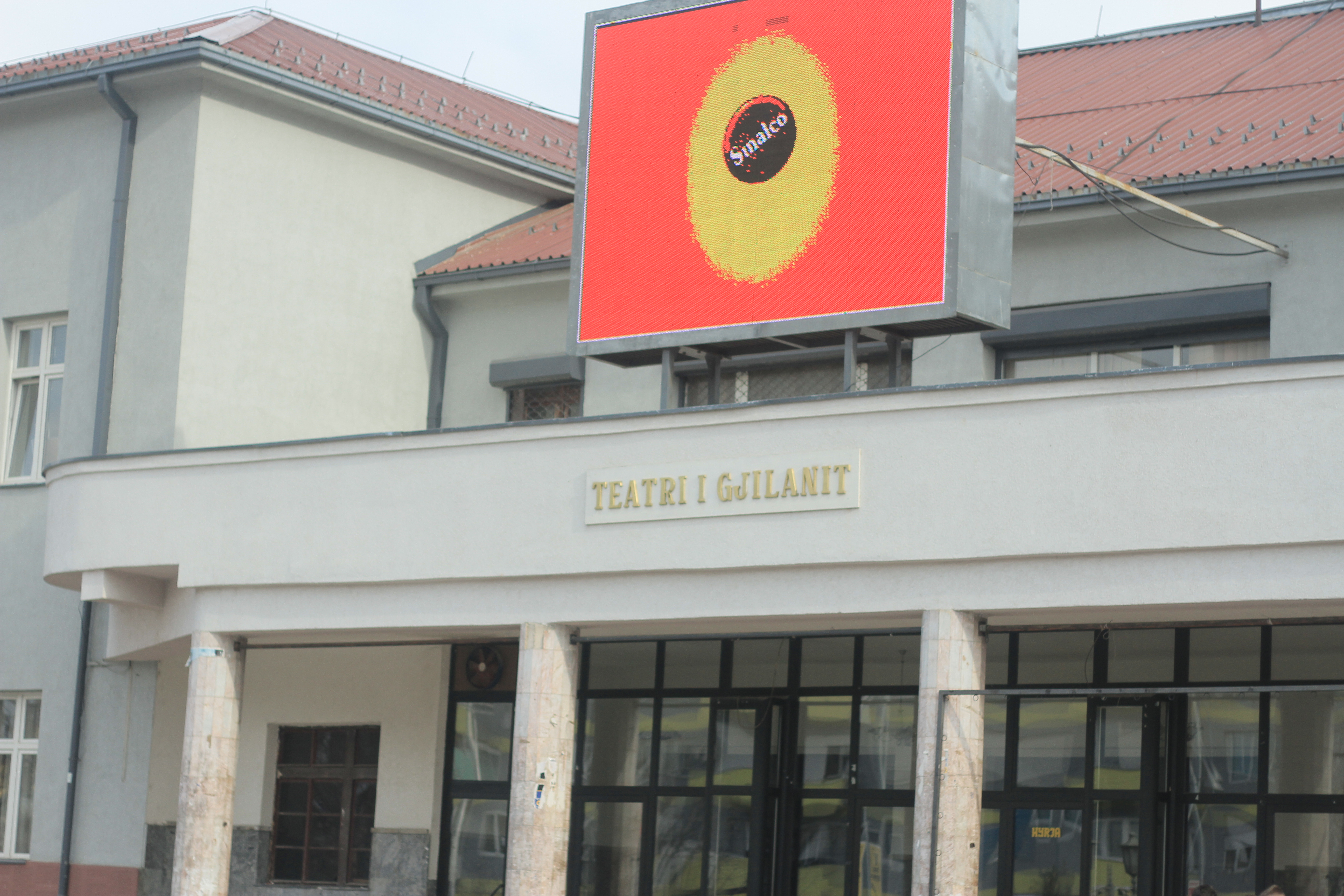 Teatri Publik i qytetit te gjilanit